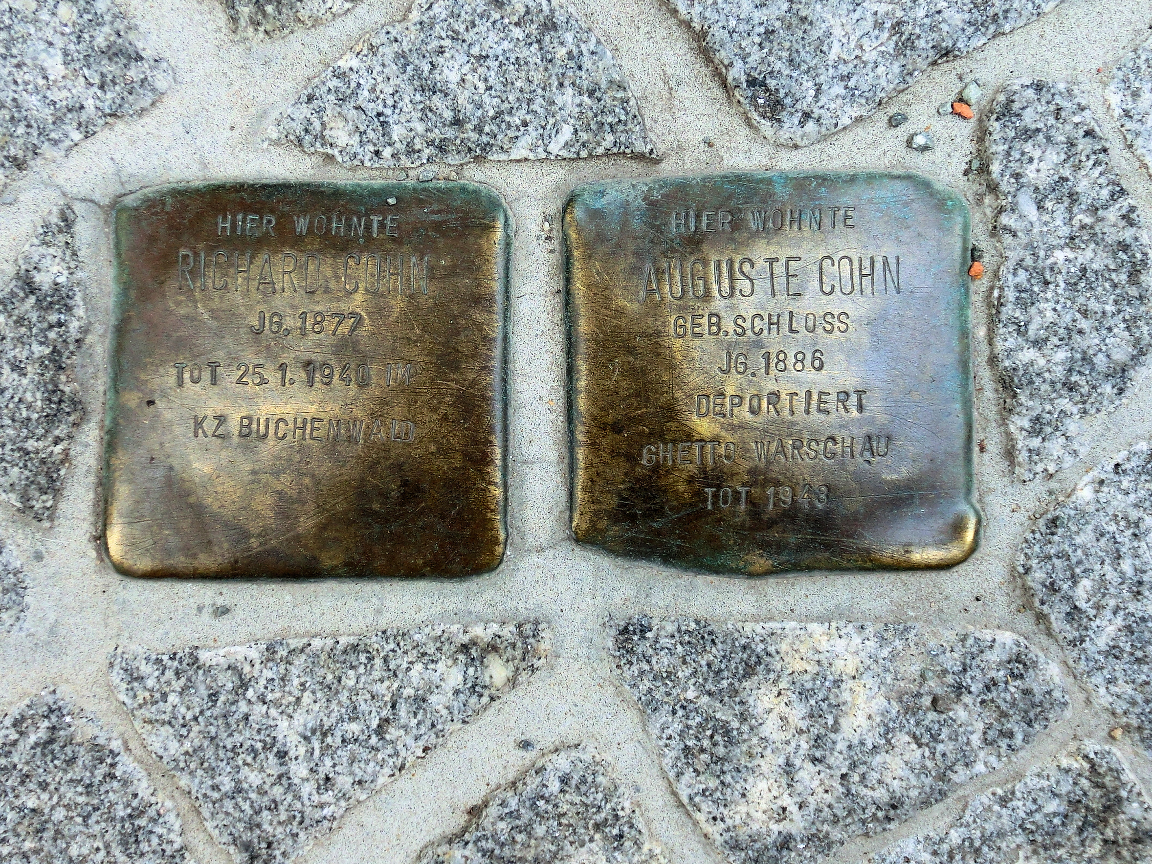 Stendal Hallstrasse Stolpersteine